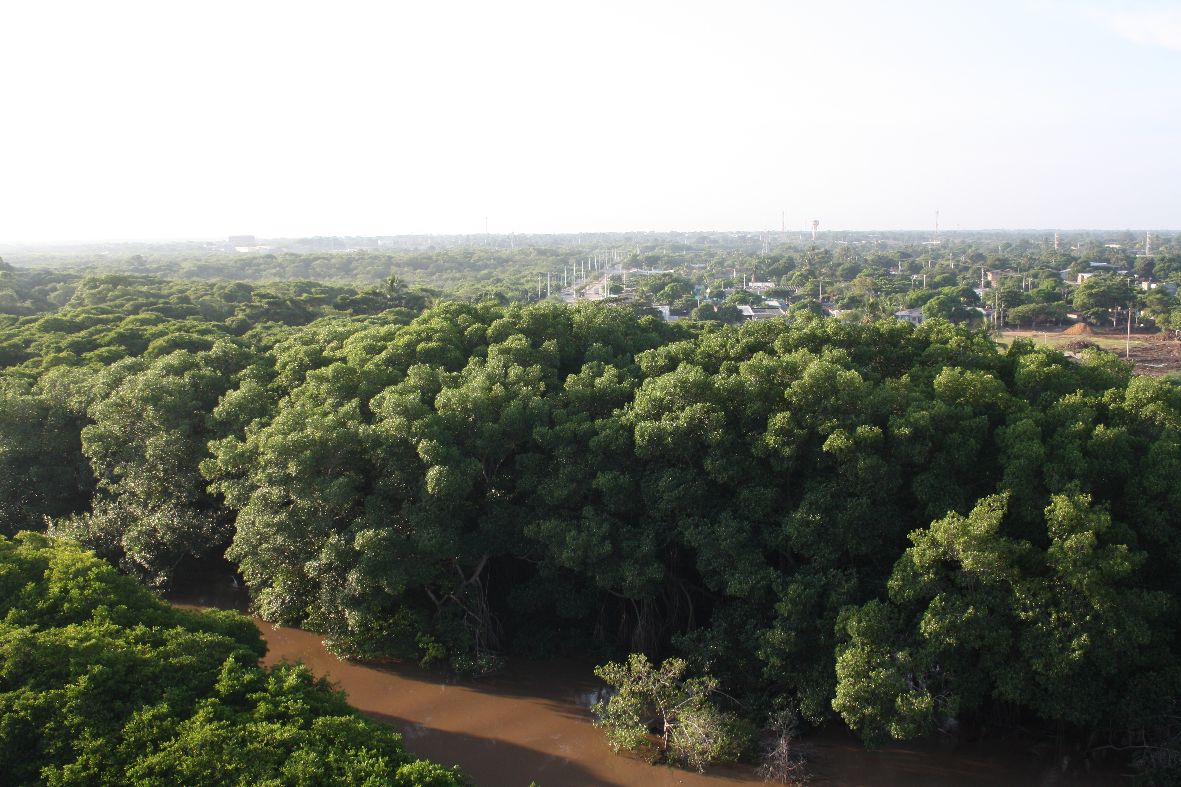 Amanecer dominical. Río Ranchería y bosque